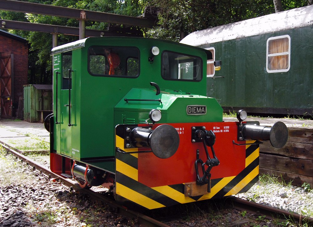 Lok MKB 03 im Bahnhof Schönow